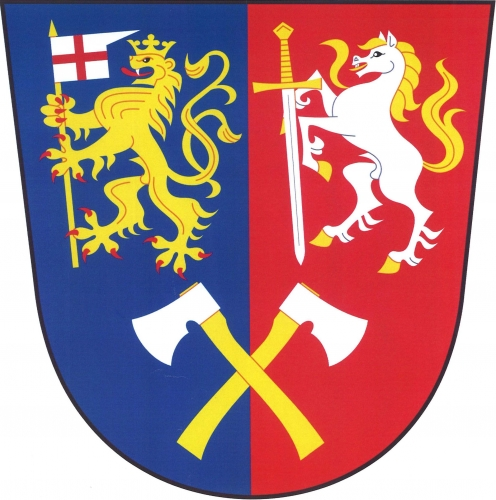 znak, Věcov, okres Žďár nad Sázavou